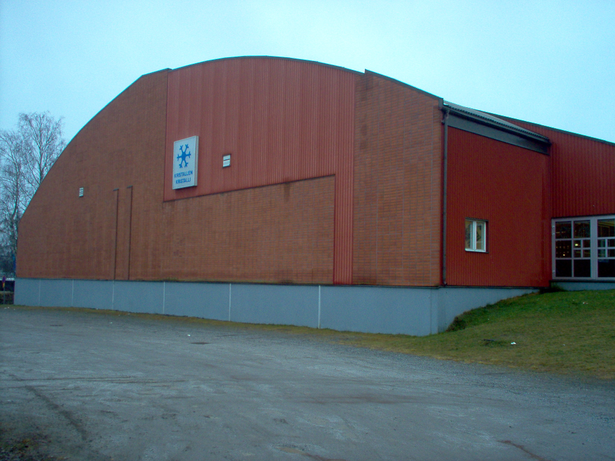 Jäähalli Kristalli, Pietarsaari